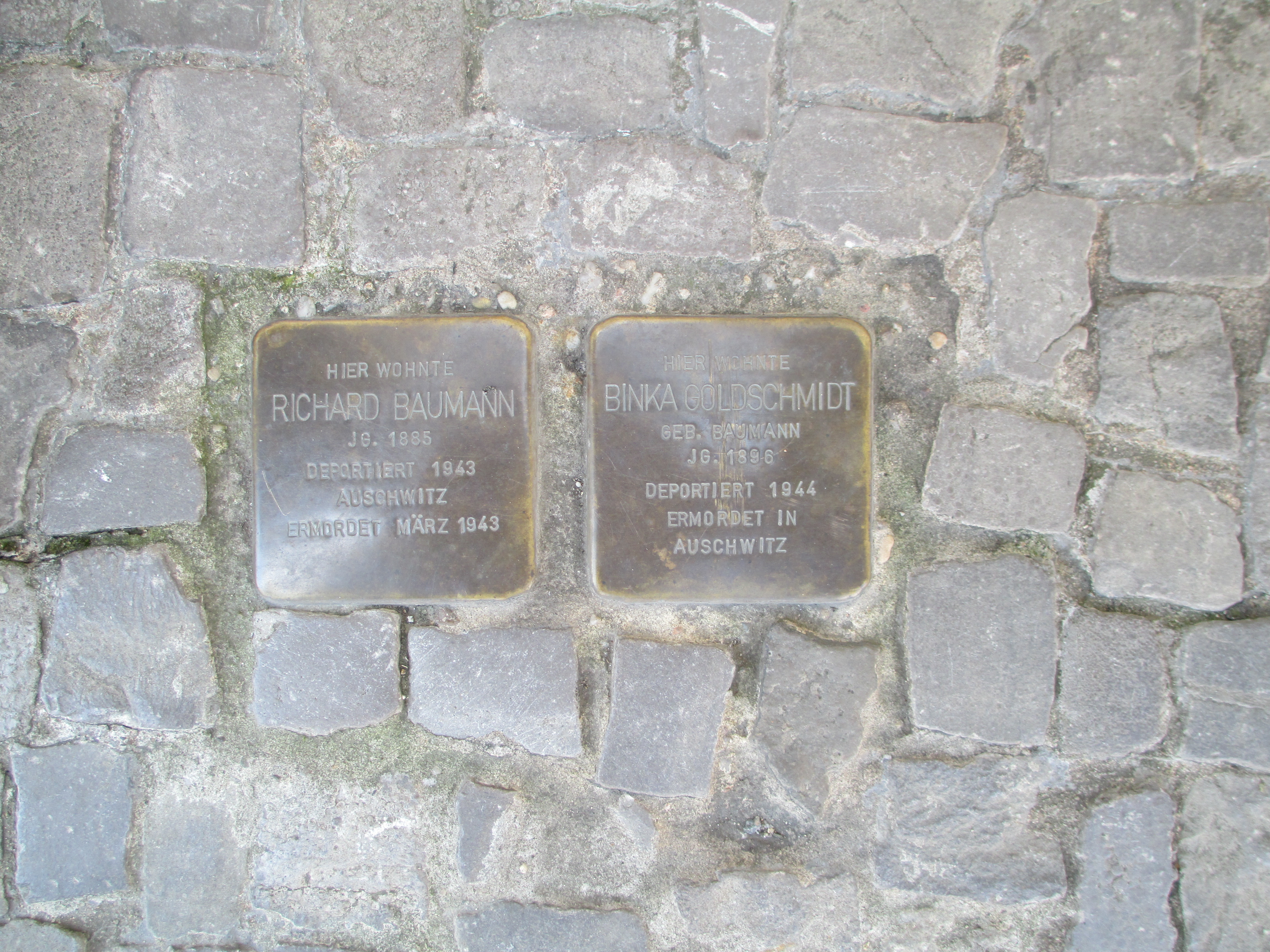 אבני נגף בוויטנברג